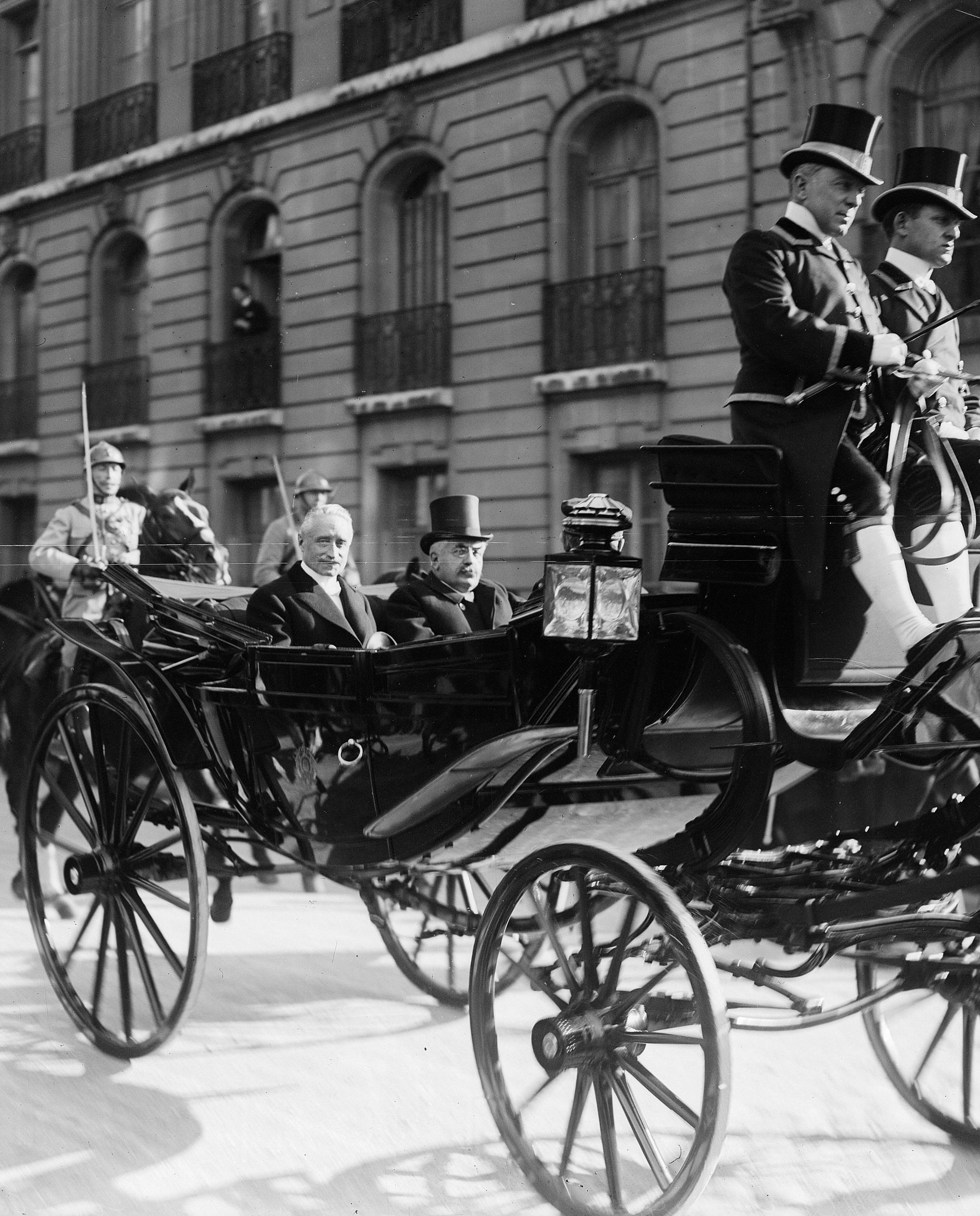 Paul Deschanel, président de la République française élu, se rendant au palais de l'Élysée pour se prise de fonction. Aux côtés d'Alexandre Millerand, président du Conseil.